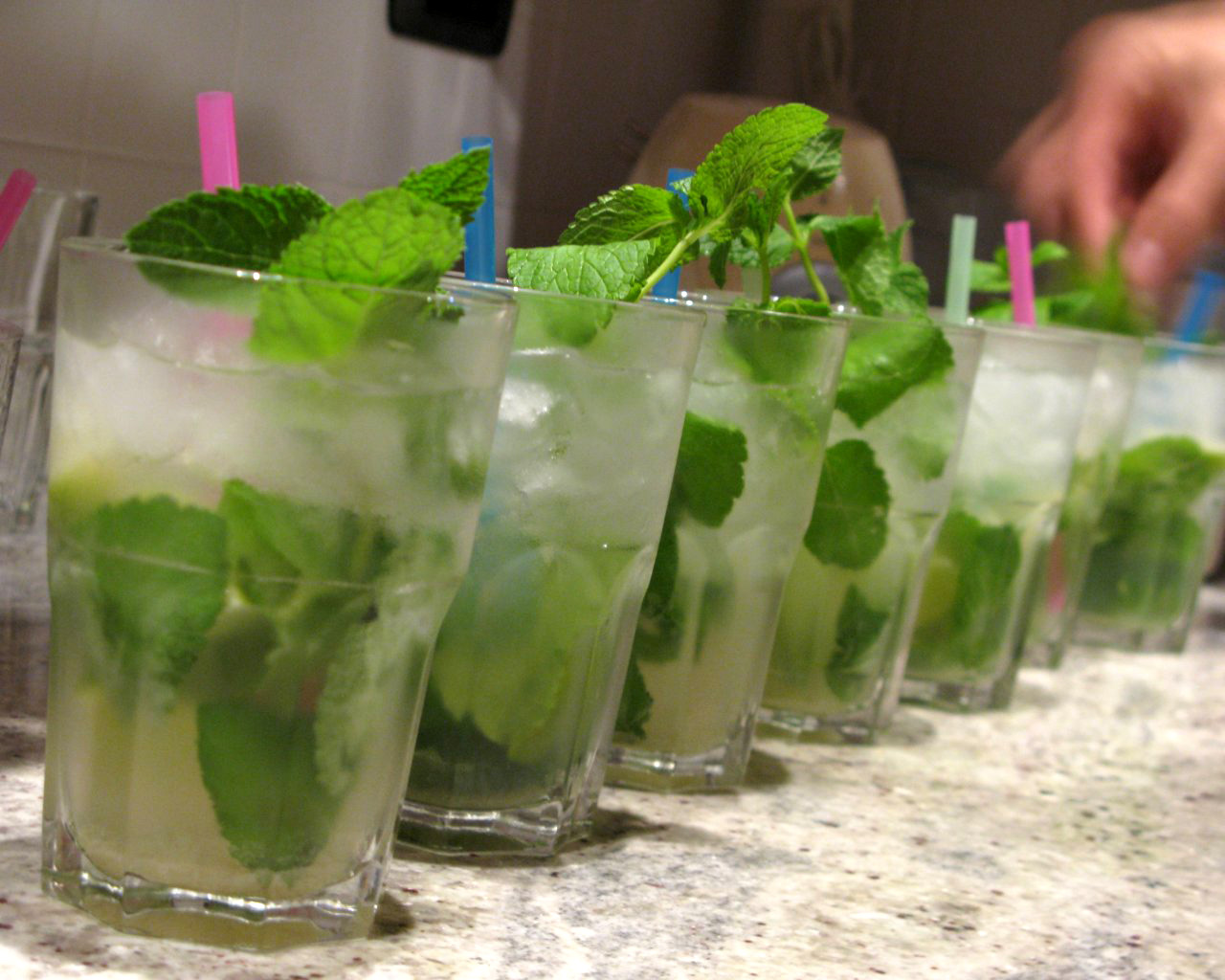 Alcuni mojitos preparati per un party.